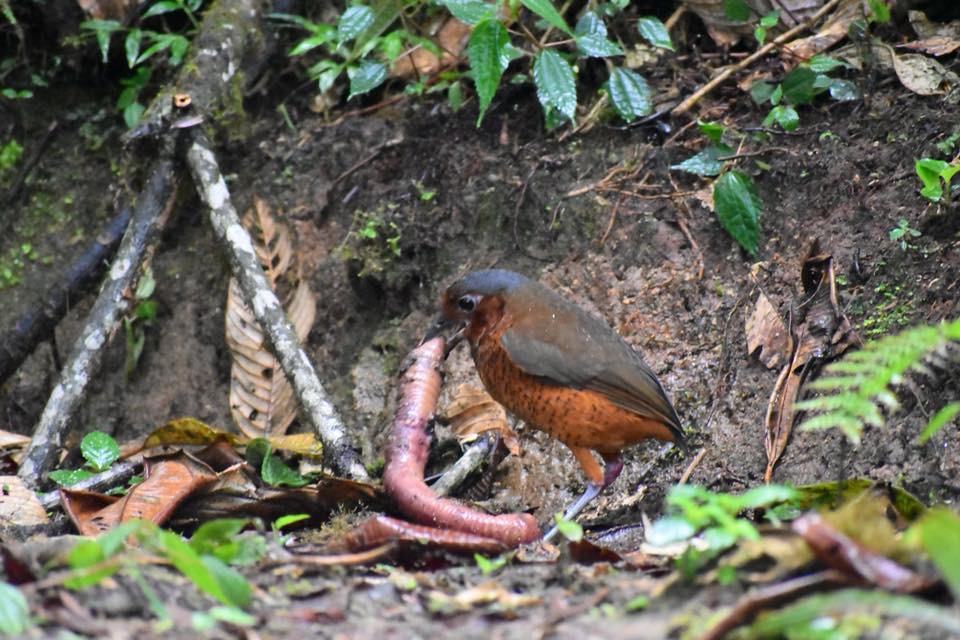 RESERVA LAS GRALARIAS